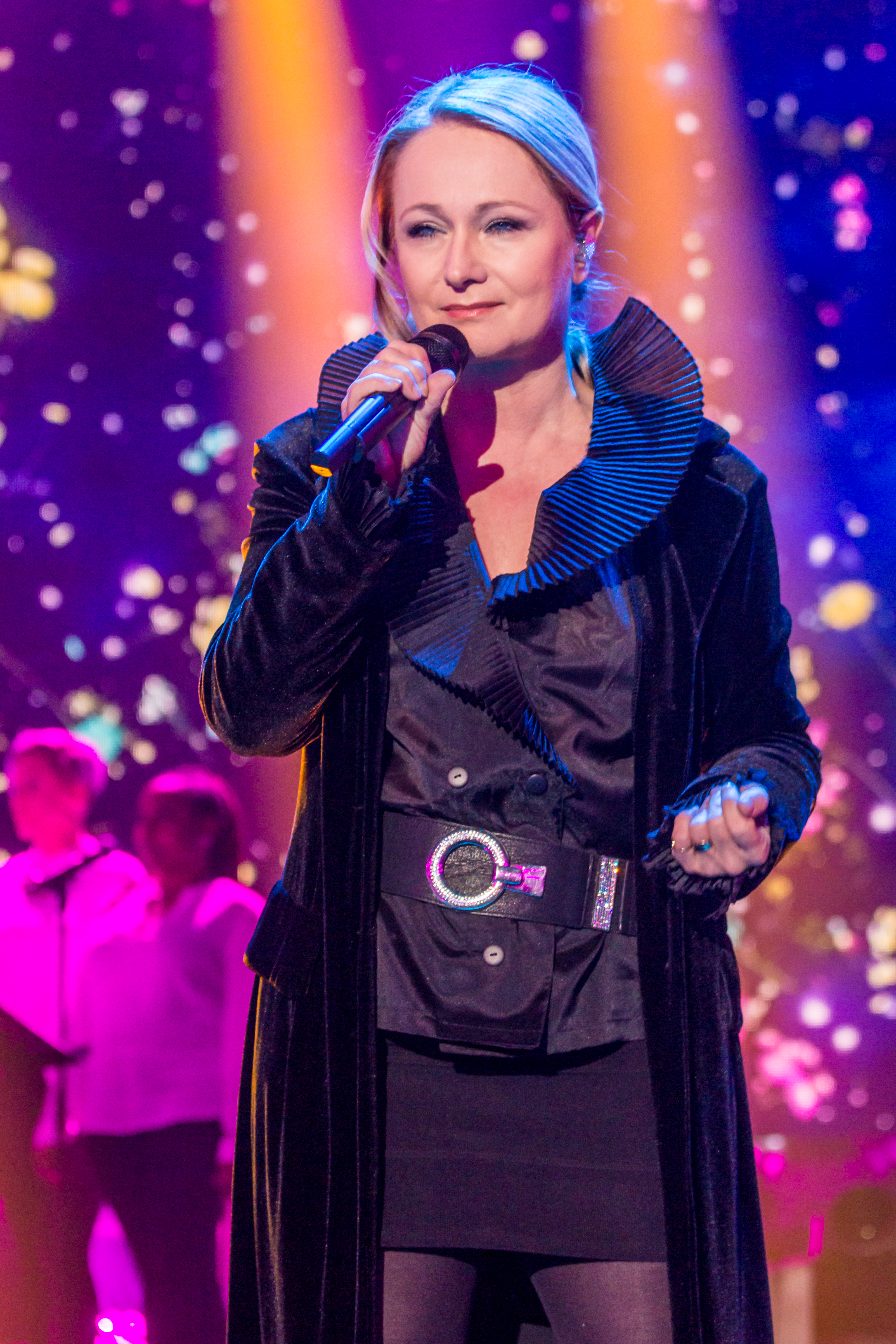 Unser Song 2017 - Generalprobe - Medley Ruslana, Nicole und Conchita